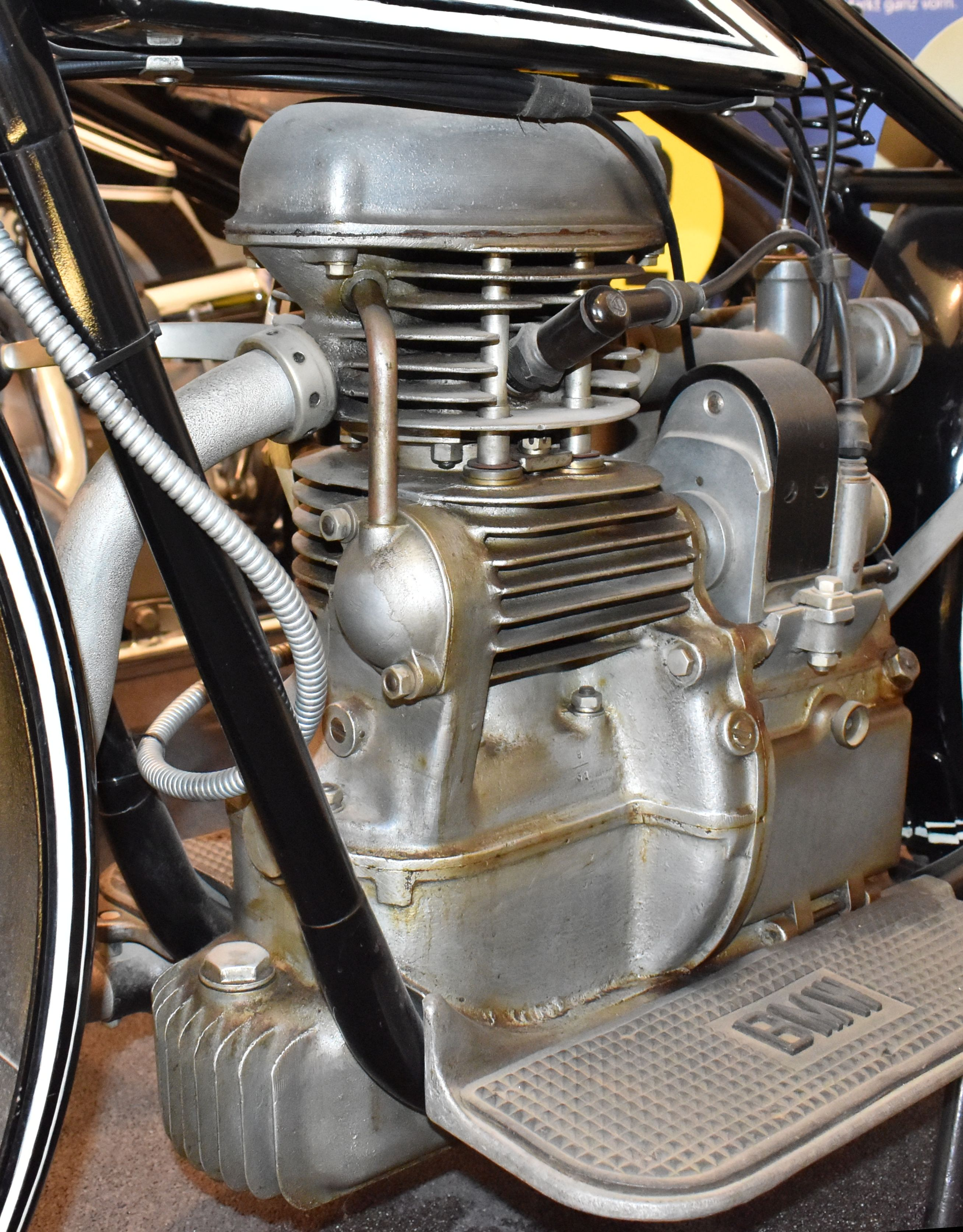 BMW R 39 im Motorradmuseum Augustusburg